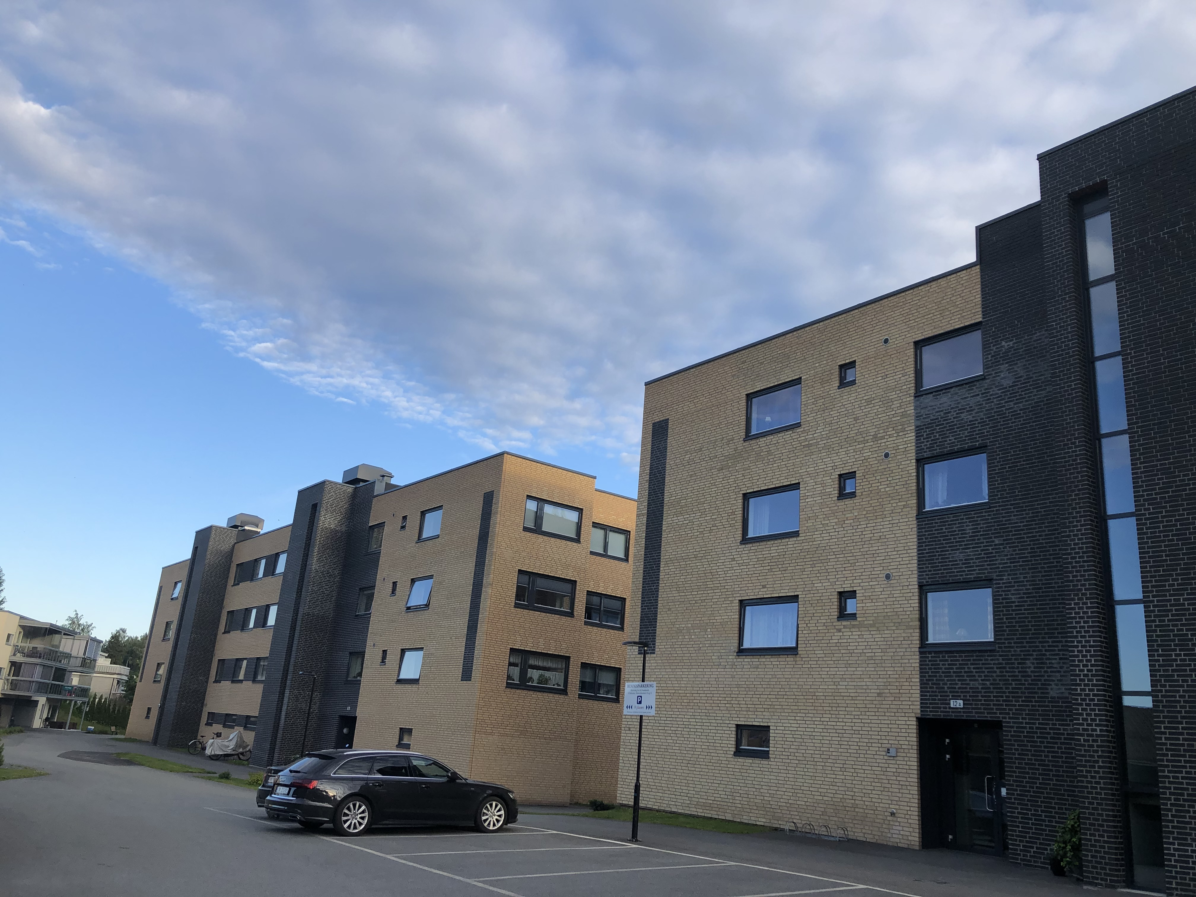 Lavblokker i Soknedalsveien 10 - 12, Hønefoss.